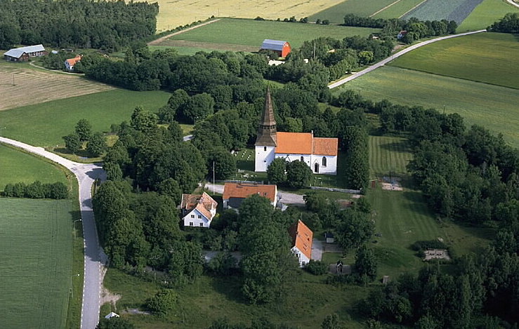 Motiv: Hogräns kyrka Nyckelord: Flygbilder, Riksintressen Kategori: Kyrkomiljö Hogräns kyrka